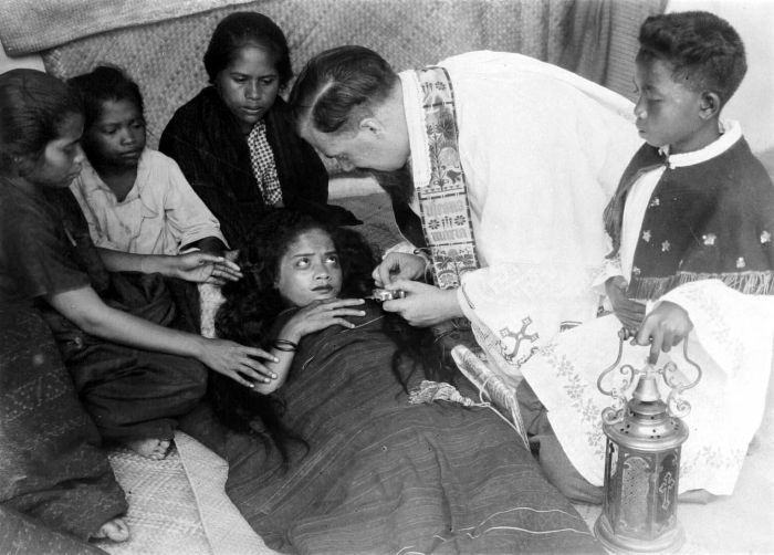 Repronegatief. Pastoor met misdienaar op ziekenbezoek in een kampong om een patiënt te bedienen, Flores.